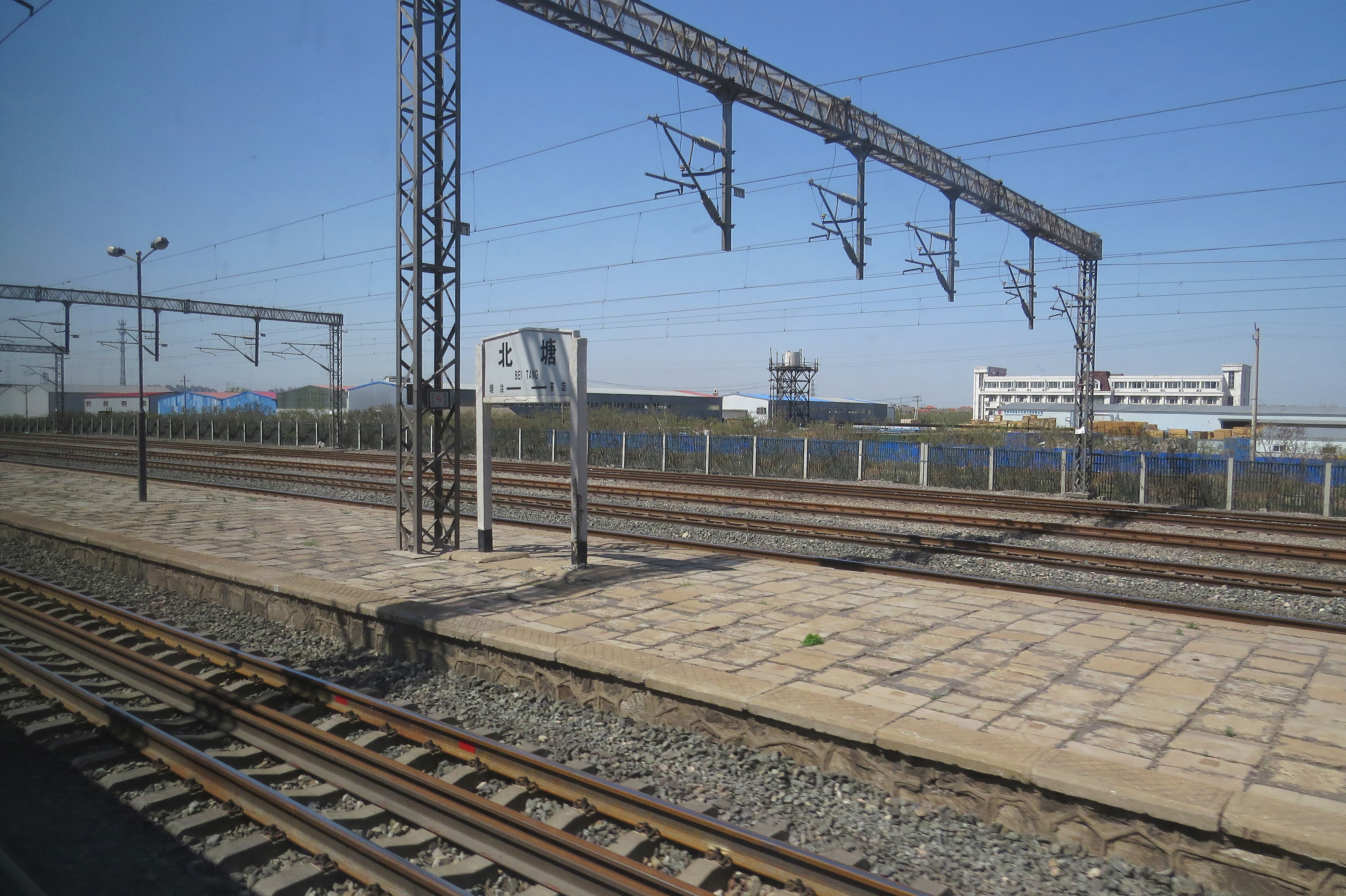 天津北塘站